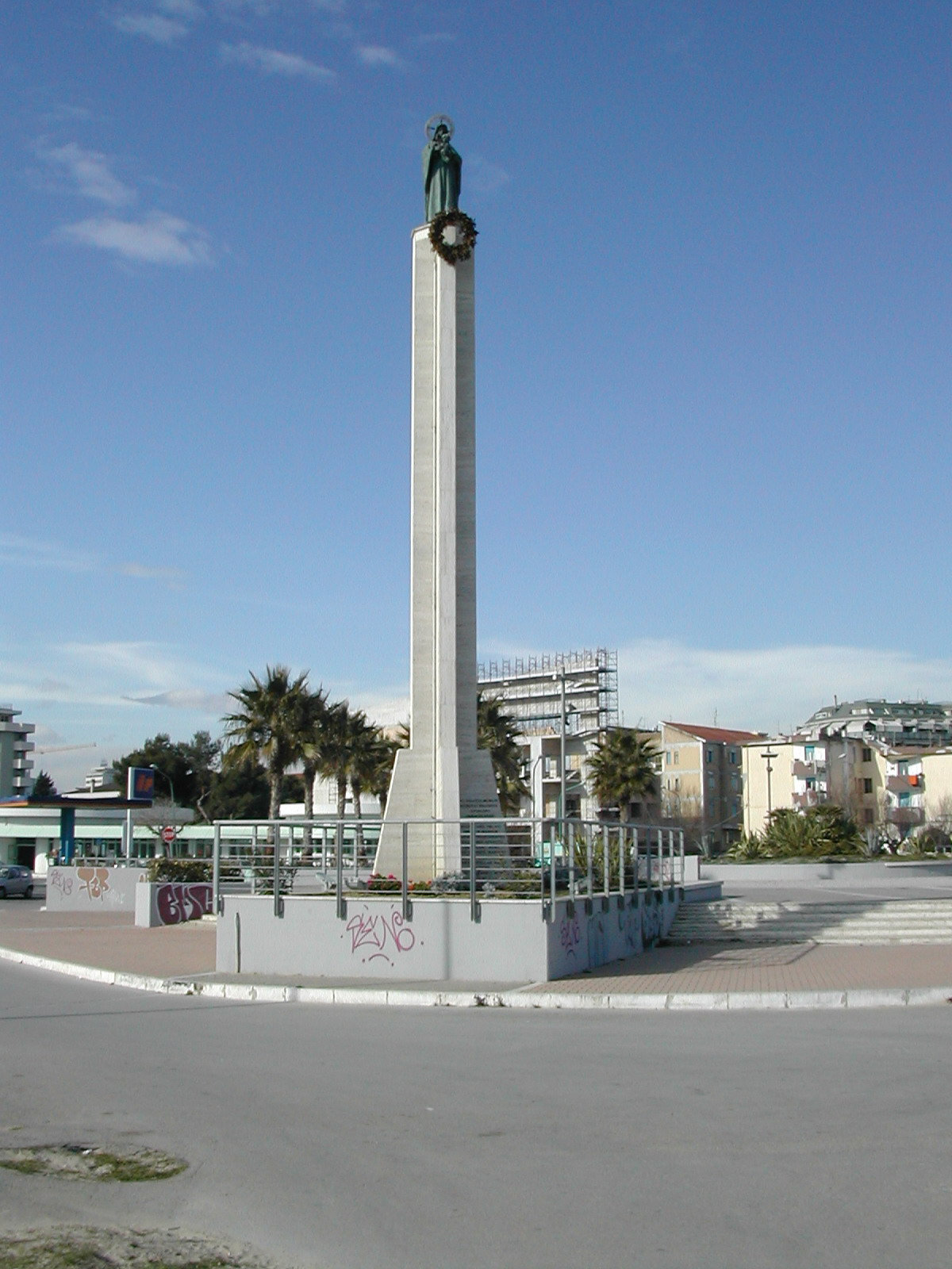 Pescara Madonnina al porto